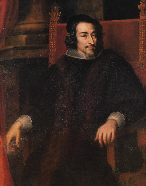 Giacinto Santagostino, Ritratto di Bartolomeo Arese. Milano, Quadreria dell’Ospedale Maggiore. Palazzo Arese, Litta in una incisione del 1757. Milano, Corso Magenta.